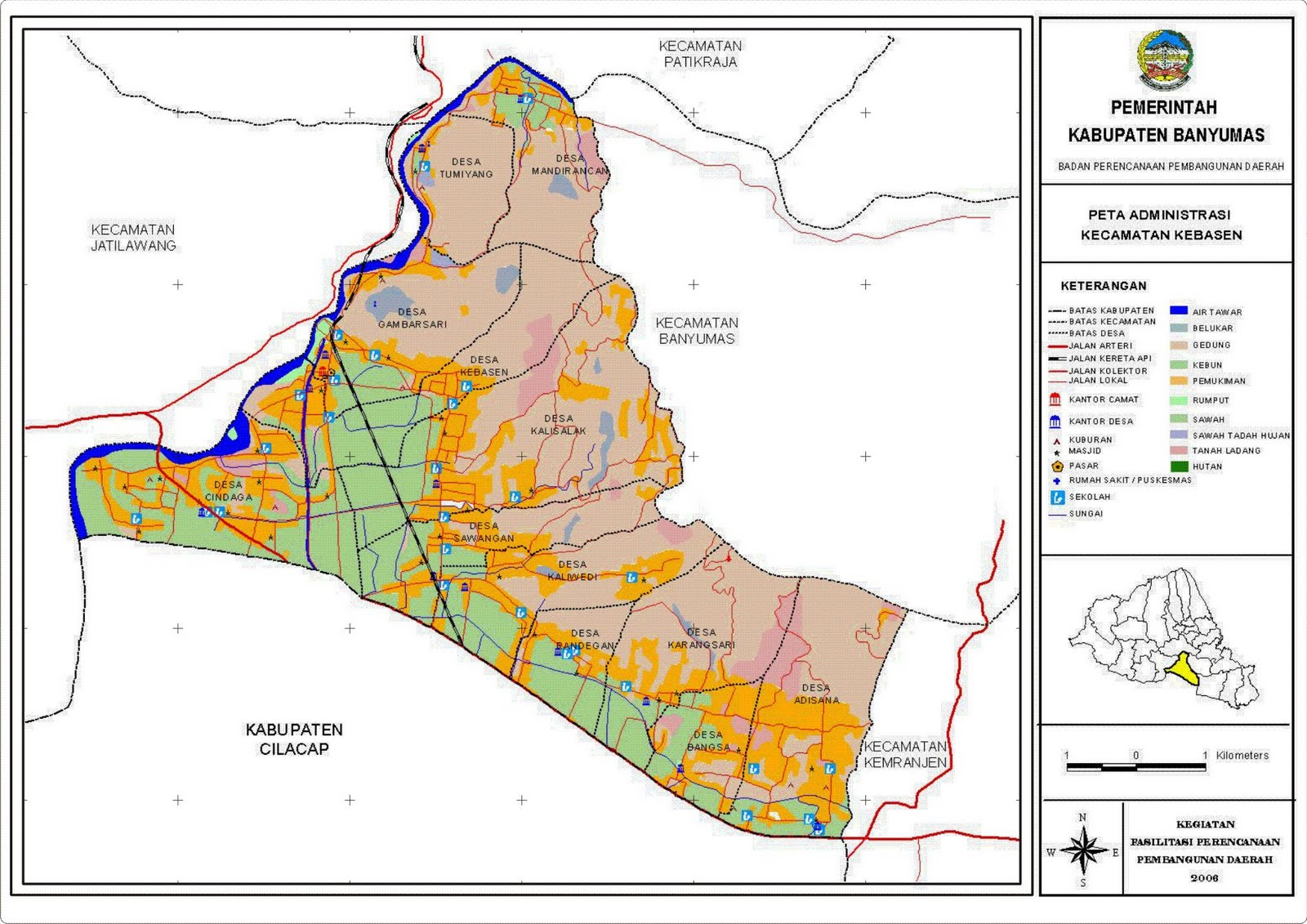 Kebasen